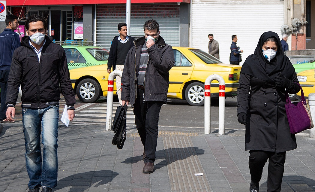 ماسک و مردم